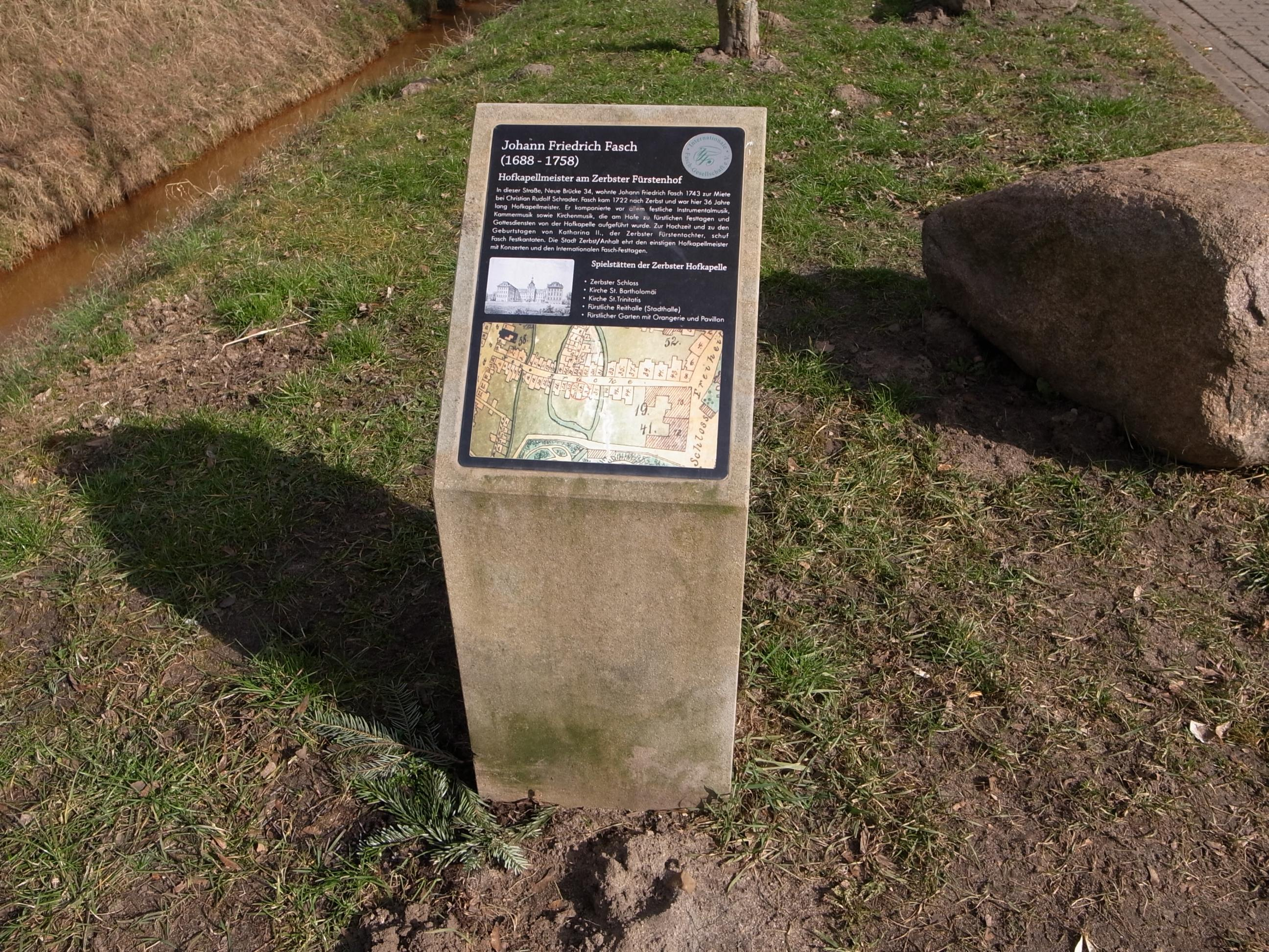 Zerbst/Anhalt. Gedenkstein für Johann Friedrich Fasch.